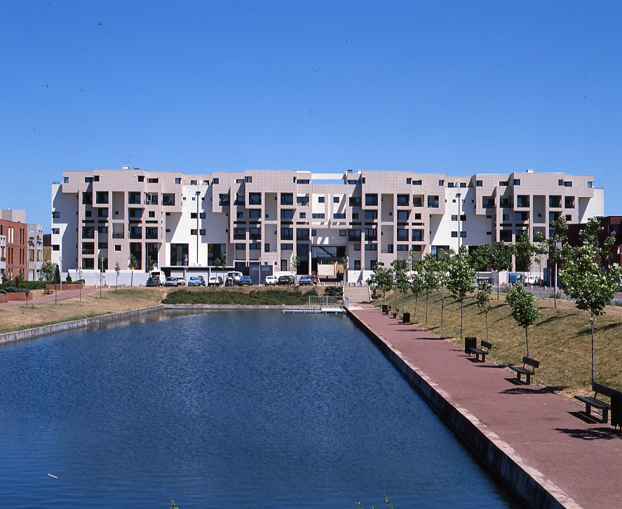 Immeuble de logements à Évry (Essonne, France).